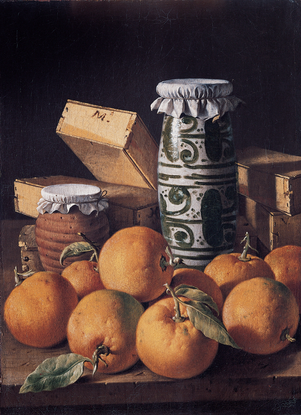 Bodegón con naranjas, orza de miel, cajas de dulce de membrillo y tarro de loza de Manises (hacia 1765). Destaca en segundo plano, a la derecha, el frasco o bote de envasar de cerámica de Manises con su clásica decoración geométrica en blanco y manganeso (negro violáceo). Documentación: Natacha Seseña (1970) La cerámica de Manises en el siglo XIX; publicado en la revista especializada "Archivo español de arte", volumen 43, número 172; páginas=395-406. Madrid, Instituto "Diego Velázquez" - CSIC; issn=0004-0428 [1] Visitado el 29 de diciembre de 2015.